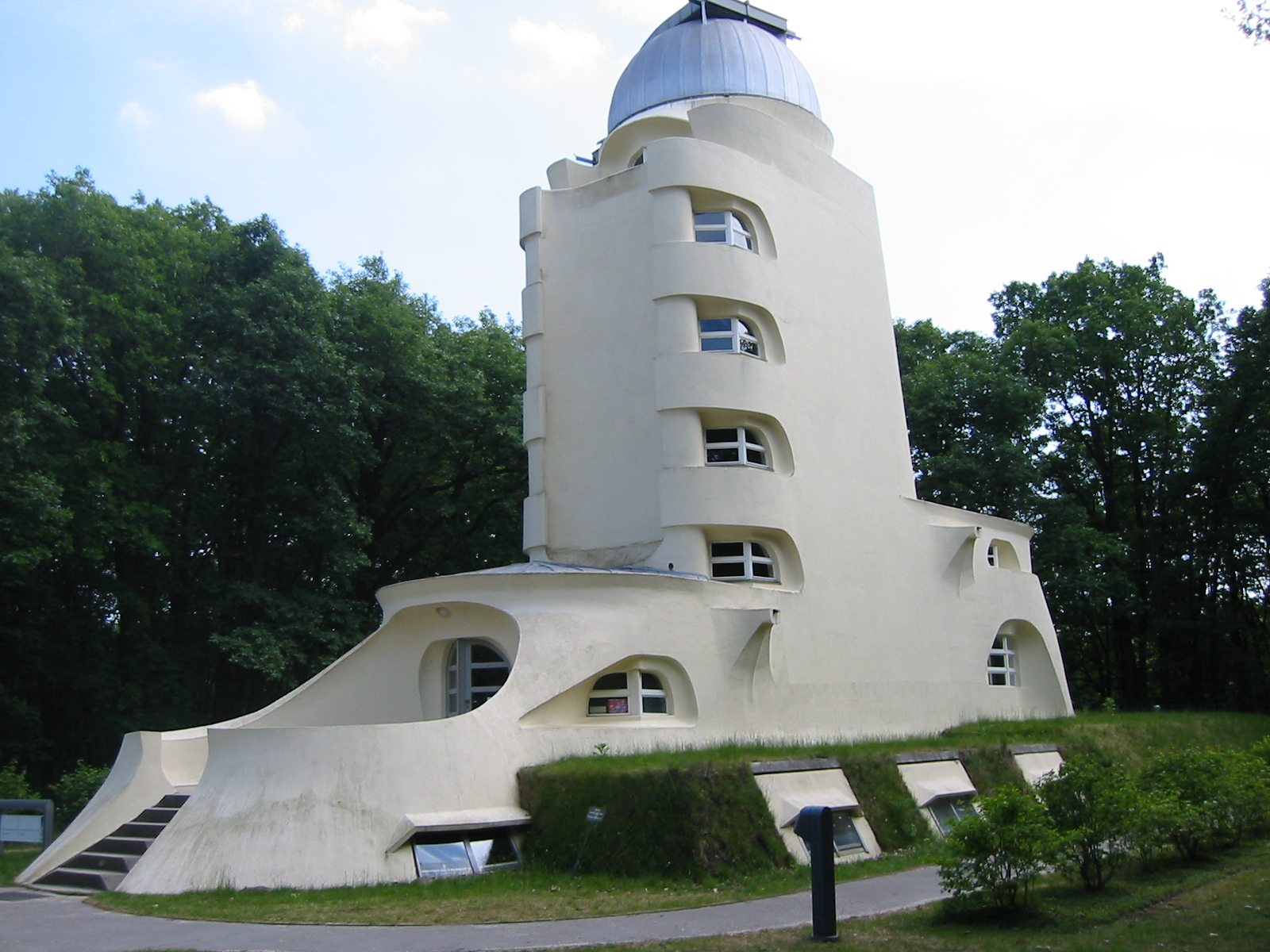 Der Einsteinturm